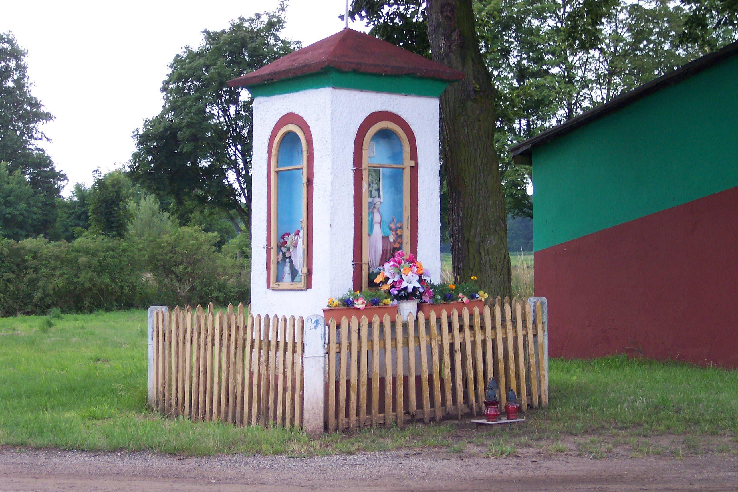 Kapliczka w Panoszowie